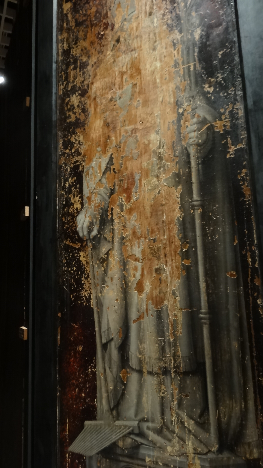 Reverso do Painel esquerdo do Tríptico da Descida da Cruz de Gerard David e seguidores. Em grisalha, São Tiago Menor está representado em vestes episcopais, com o pente de cardador como atributo